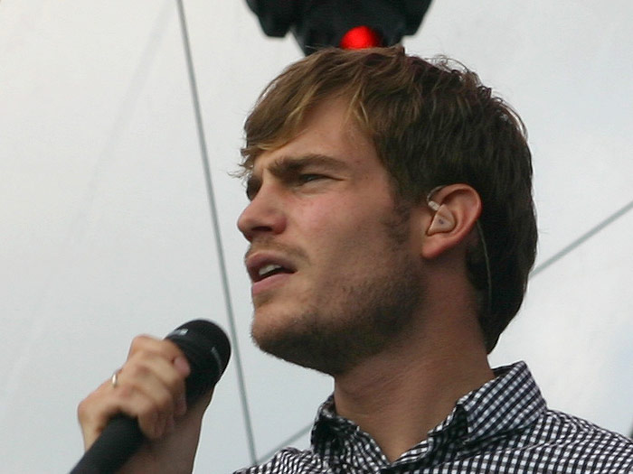 Tim Akkerman tijdens de Uitmarkt van 2008